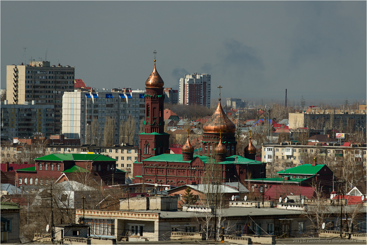 Храм Казанской иконы Божьей матери, Тольятти